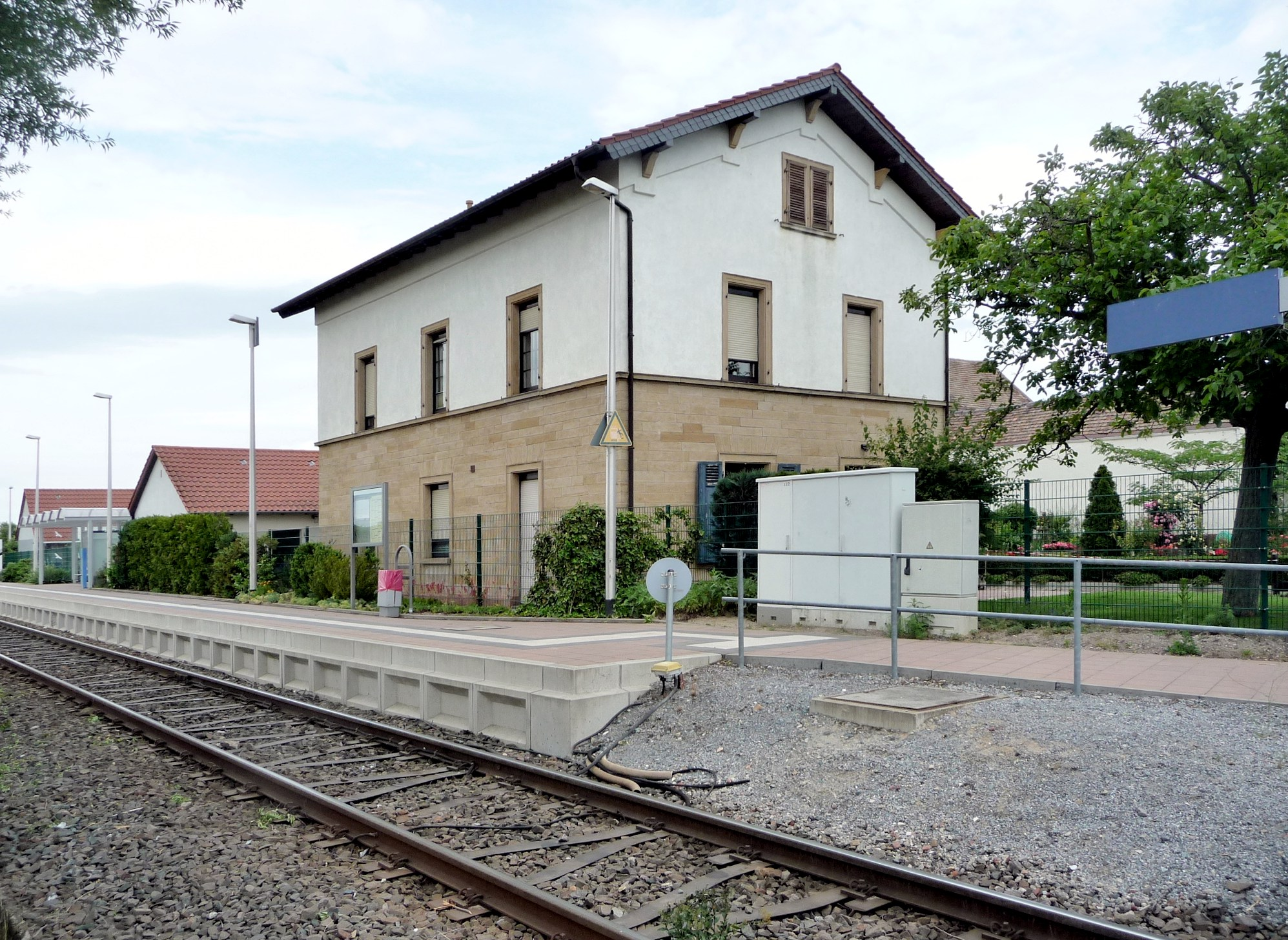 Erpolzheim ist eine Ortsgemeinde im Landkreis Bad Dürkheim in Rheinland-Pfalz.